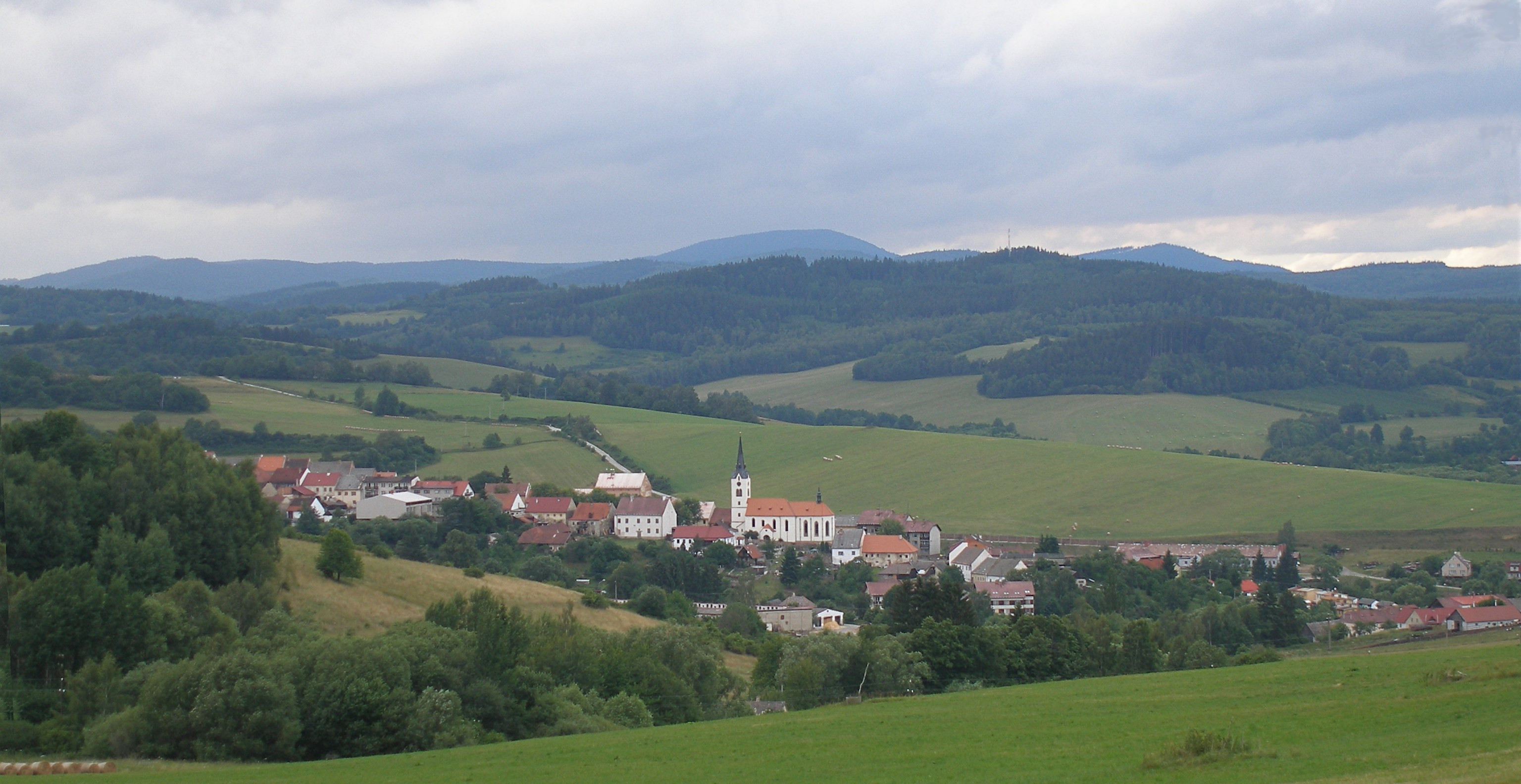 Hořice na Šumavě - celkový pohled od jihu